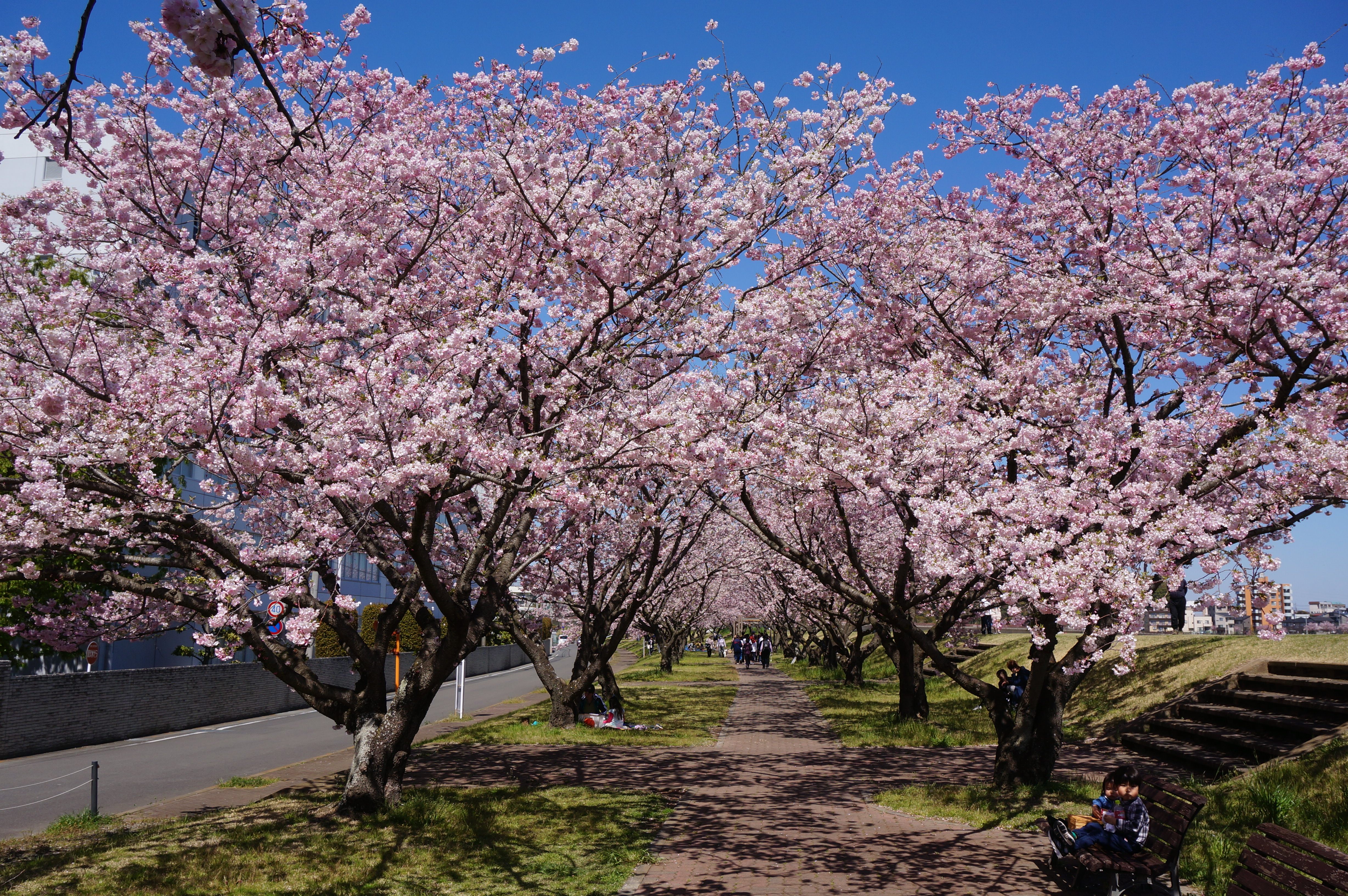 思川桜, 白鴎大学本キャンパス脇